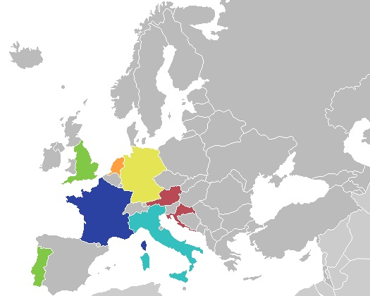 Teilnehmerländer der U-19-EM 2016 und ihr Abschneiden